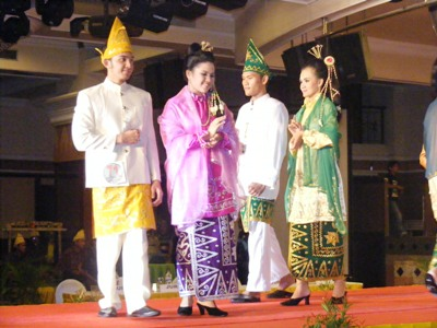 Pemilihan Nanang Galuh Banjar Kota Banjarmasin 2013